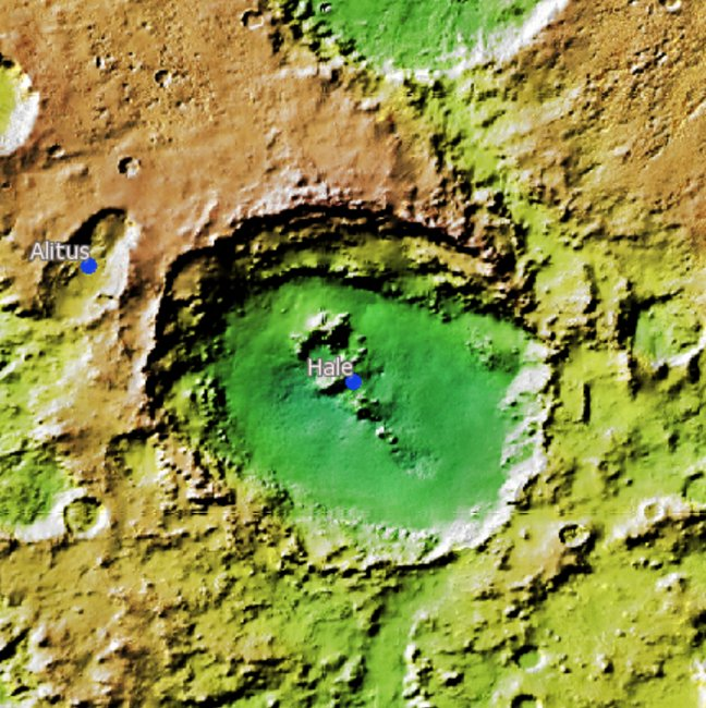 Cráter marciano Hale. (Imagen IAU/USGS/Goddard/A SU/USGS)